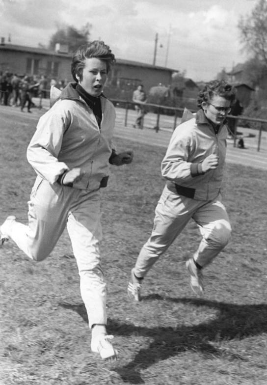 Bärbel Mayer, Gisela Köhler Zentralbild Wendorf Bey.-ot. 5.5.1957 Leichtathletik-Bahnsaison eröffnet. In allen Bezirken der DDR wurde am Sonntag, dem 5.5.1957, die Leichtathletik-Bahnsaison eröffnet. In Berlin trafen sich die Sportfreunde in Adlershof, um die ersten Sieger des Jahres 1957 zu ermitteln. UBz: Die deutschen Olympiateilnehmerinnen Bärbel Mayer (links) und Gisela Köhler (beide Dynamo Berlin) bei einem leichten Auflockerungslauf vor dem Rennen.